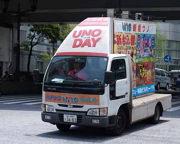 日産アトラス10をベースにしたパチンコ店の宣伝カー。中央区銀座にて